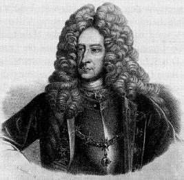 Markgraf Ludwig Wilhelm von Baden-Baden (1655-1707)